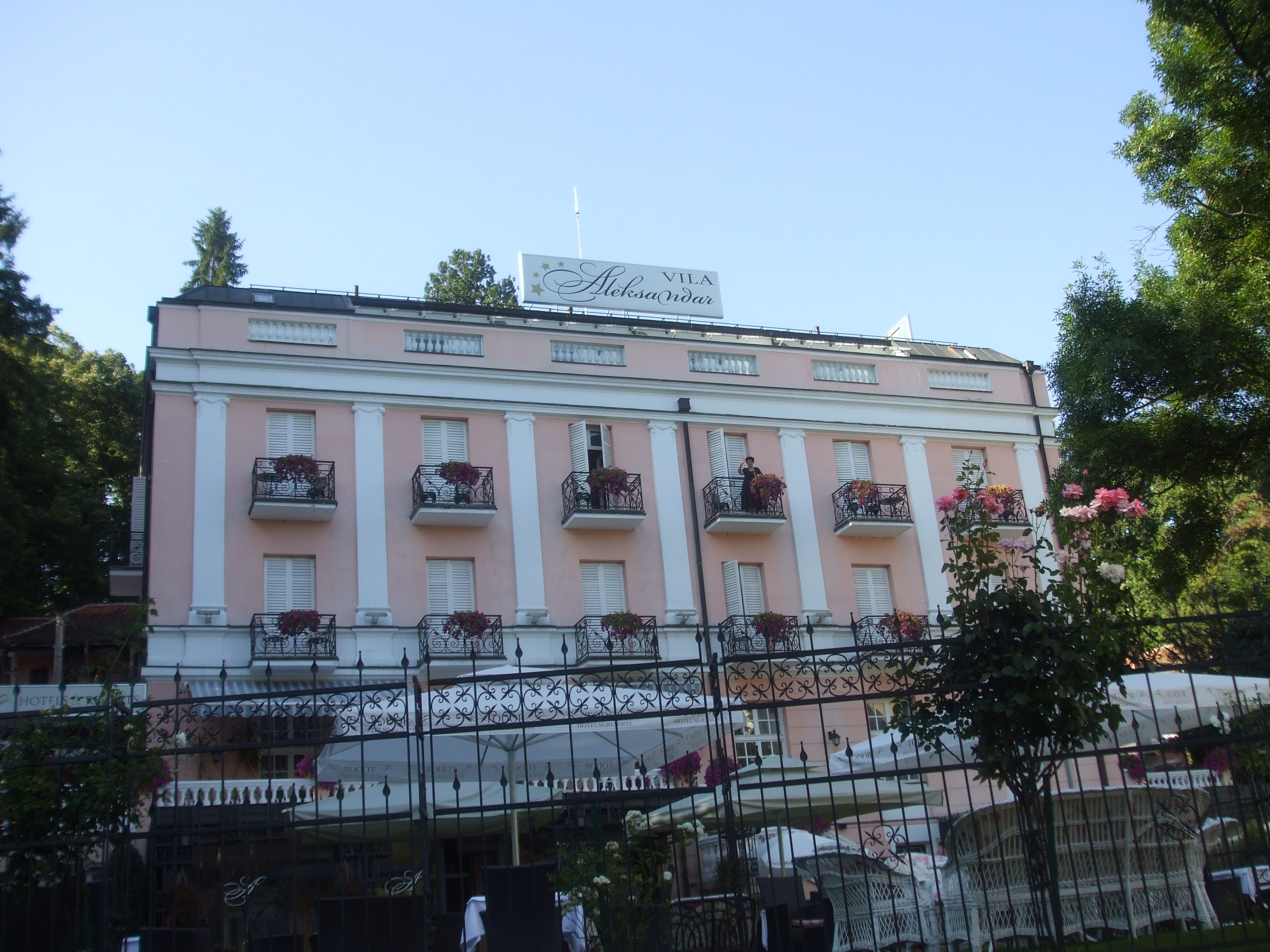 Хотел - вила Александар, поглед са истока; снимио Драгољуб.